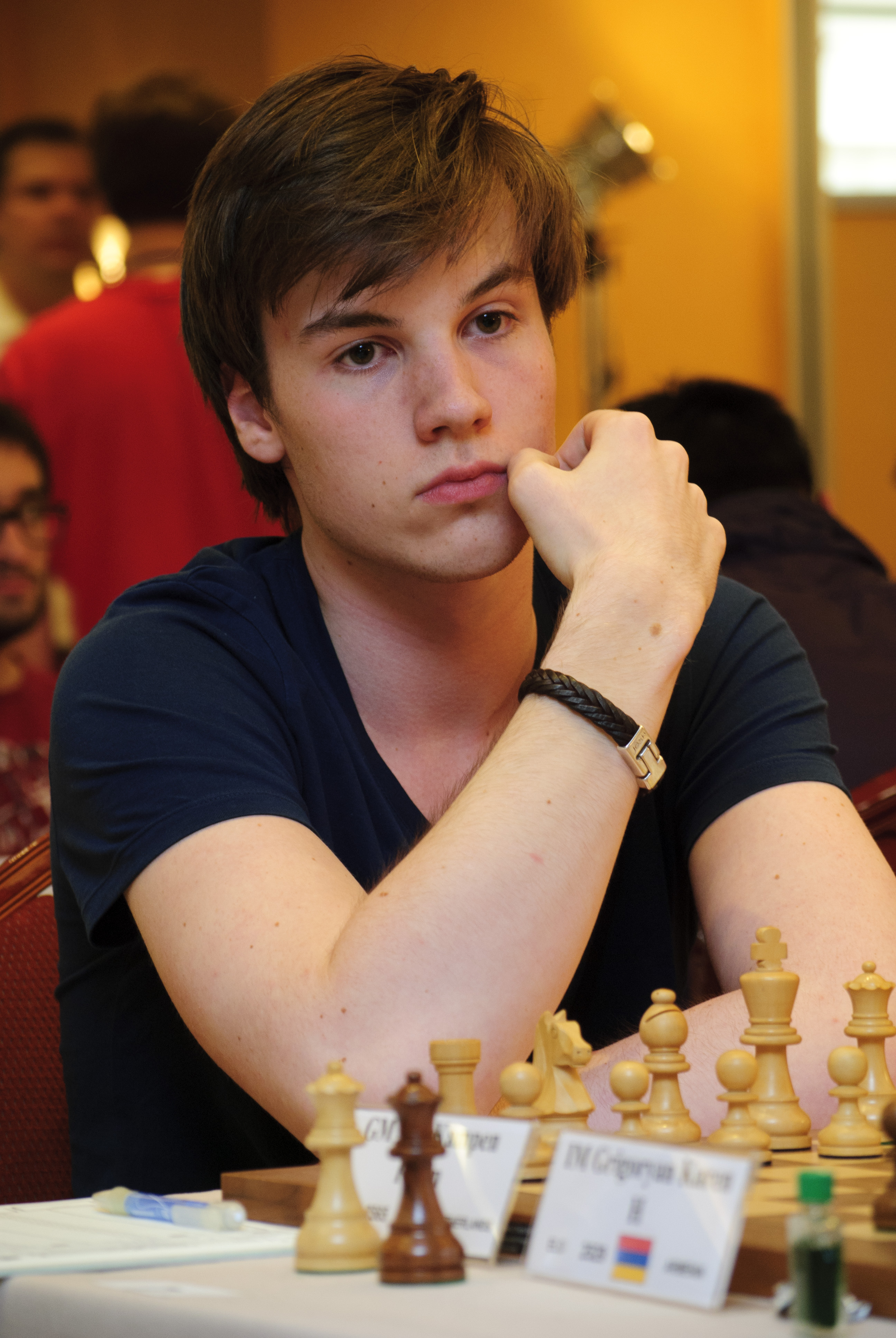 GM Van Kampen Robin, WChJ Athens 2012